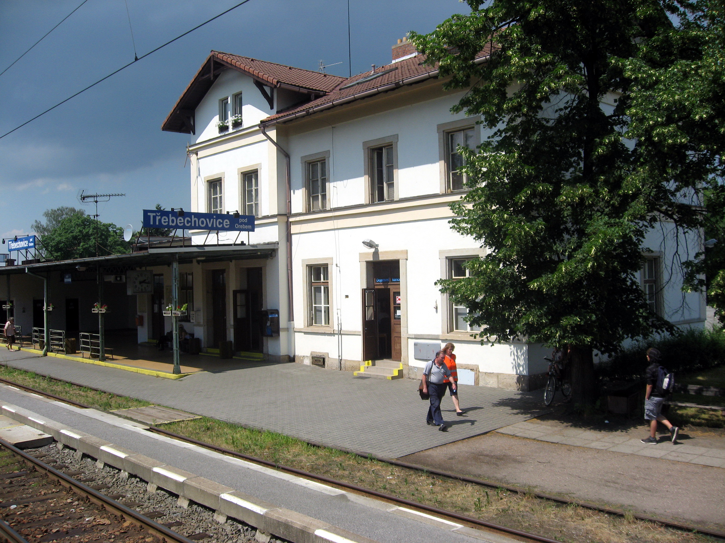 Třebechovice pod Orebem, nádraží